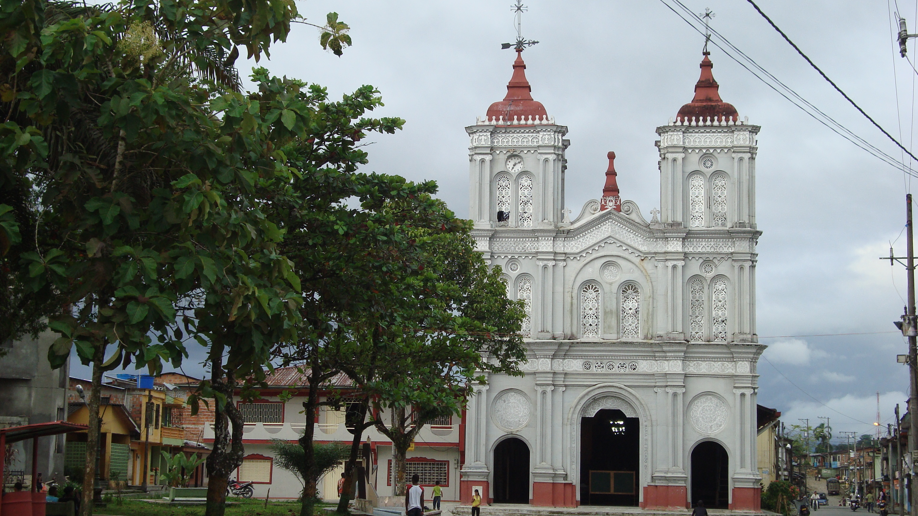 Catedral de Tadó